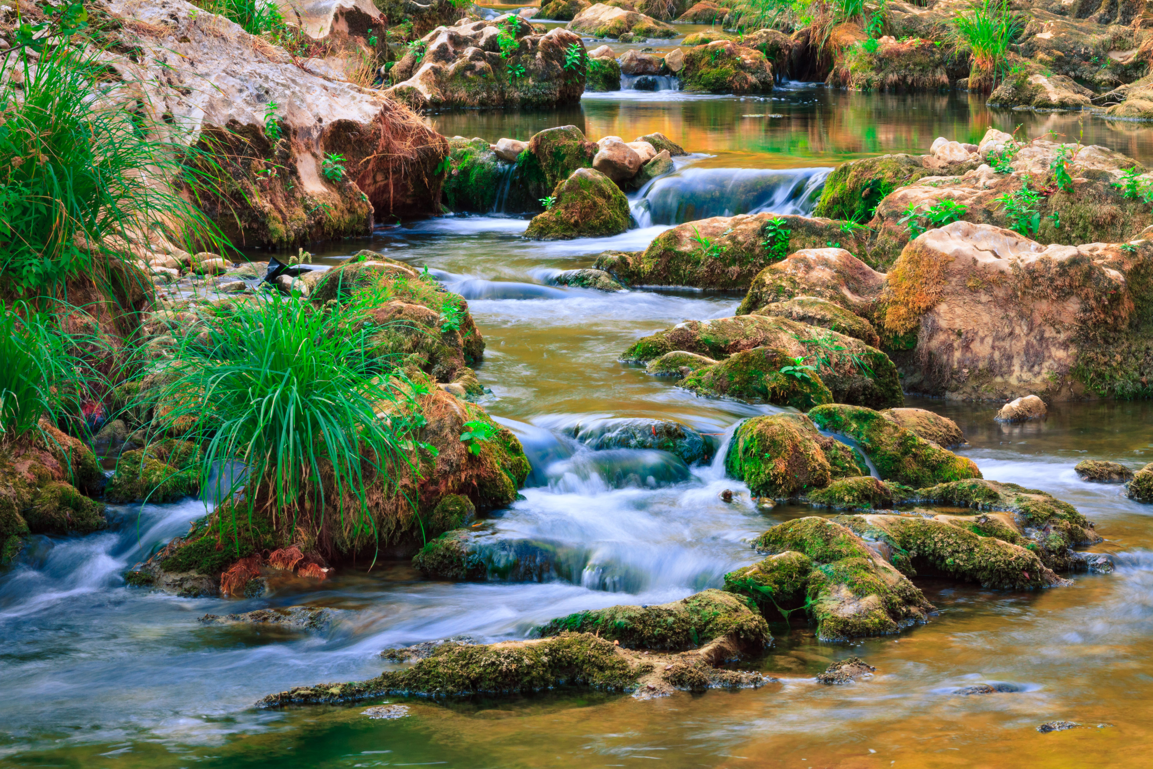 Ово је фотографија заштићеног природног добра у Србији под шифром: ПИО21 This is a a photo of a natural area in Serbia with ID: ПИО21 Предео изузетних одлика Лептерија